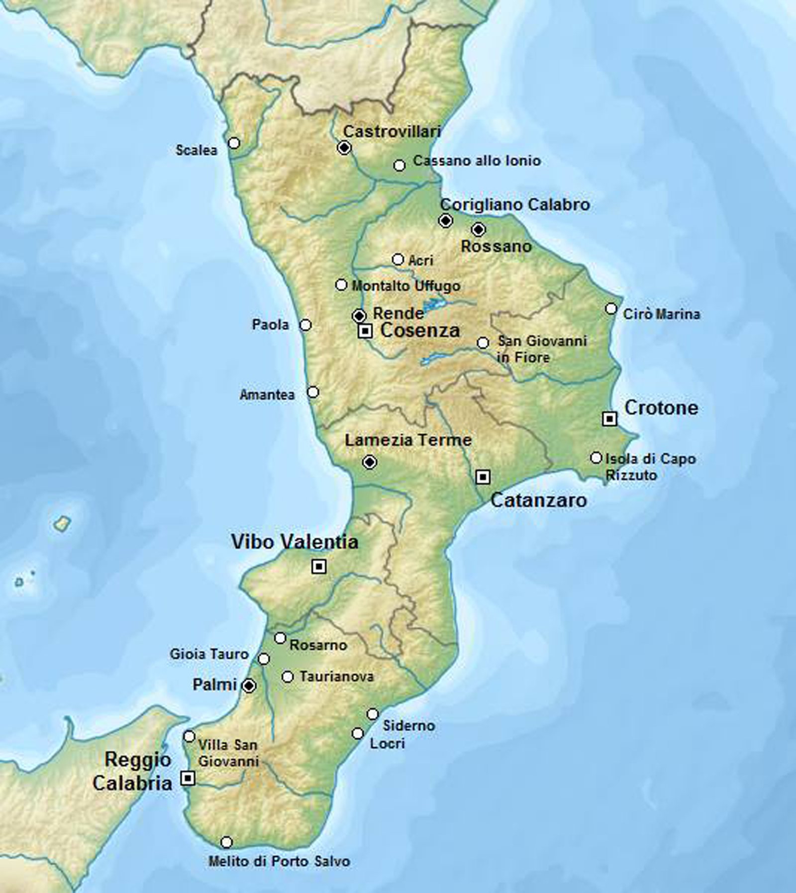 Cartina della Regione Calabria con evidenziate le città più importanti.